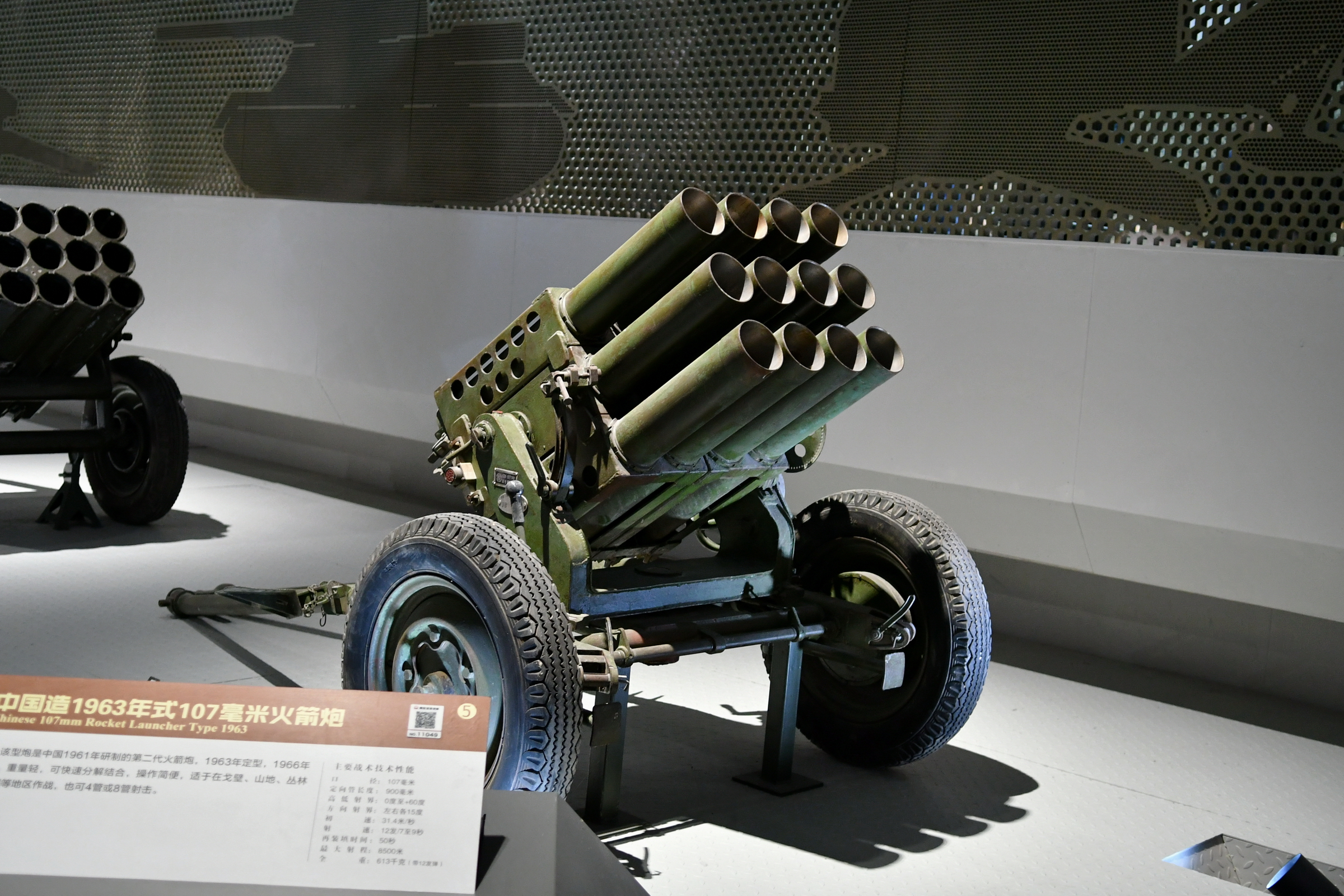 中国造1963年式107毫米多管火箭炮